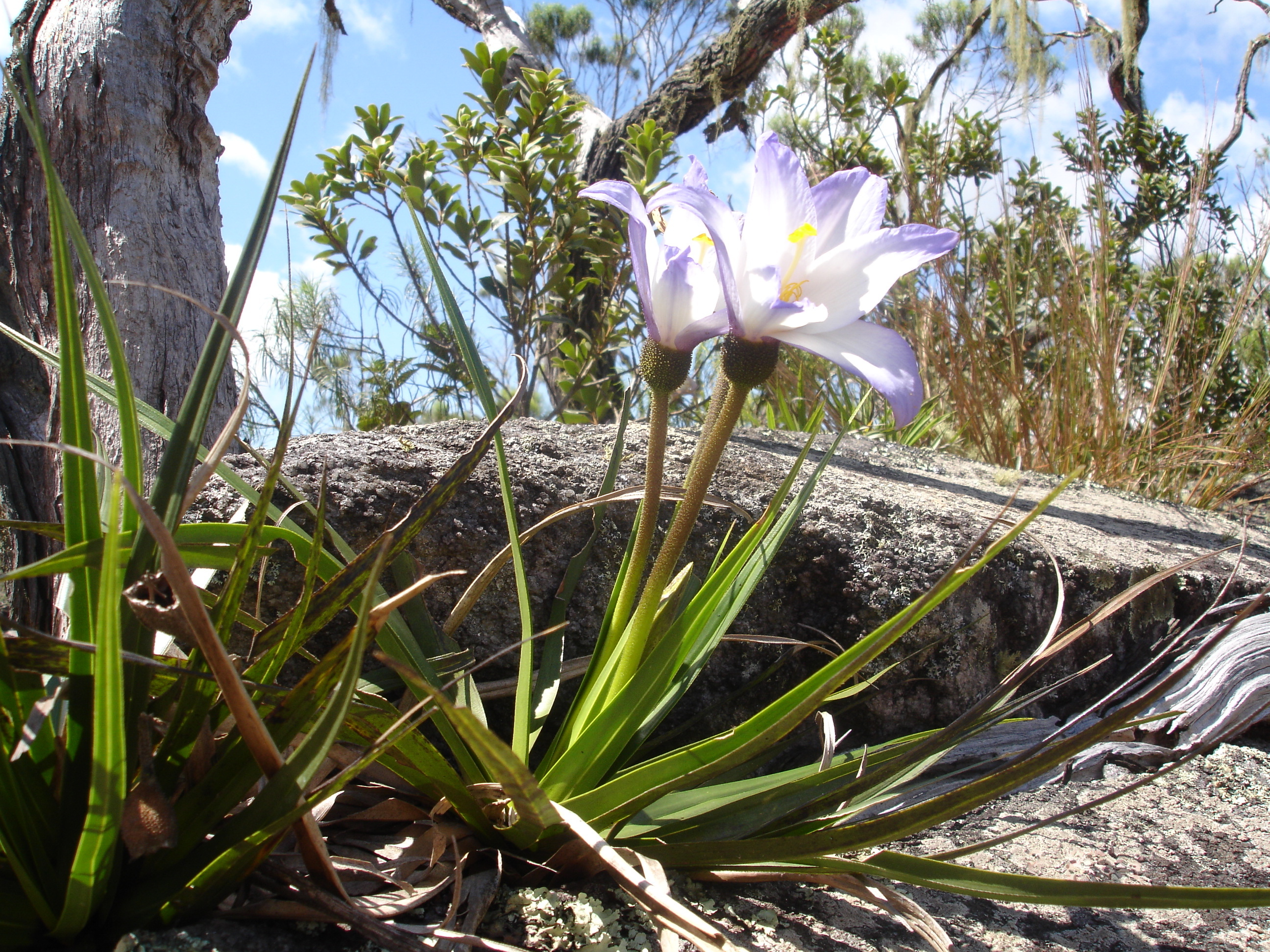 Uma Vellozia sp. no Parque Estadual do Ibitipoca, estado de Minas Gerais, Brasil